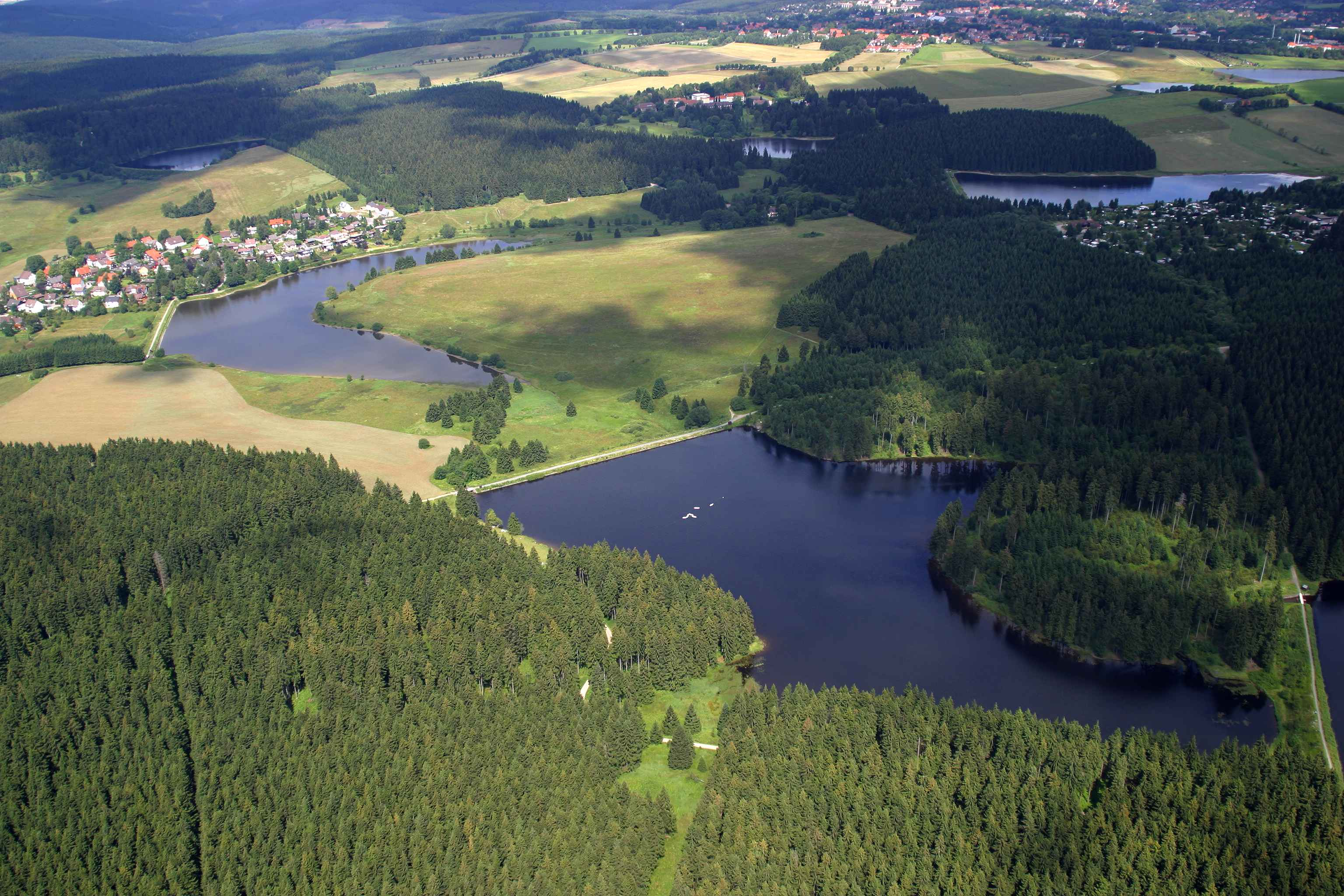 Teiche bei Buntenbock südlich von Clausthal-Zellerfeld: Ziegenberger Teich (vorn) und Sumpfteich. Gut zu erkennen sind die Dammbauwerke.